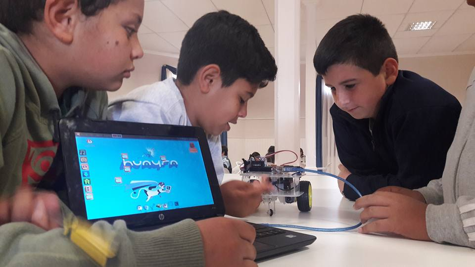 Taller de Roótica Educativa de #MinCyTCba